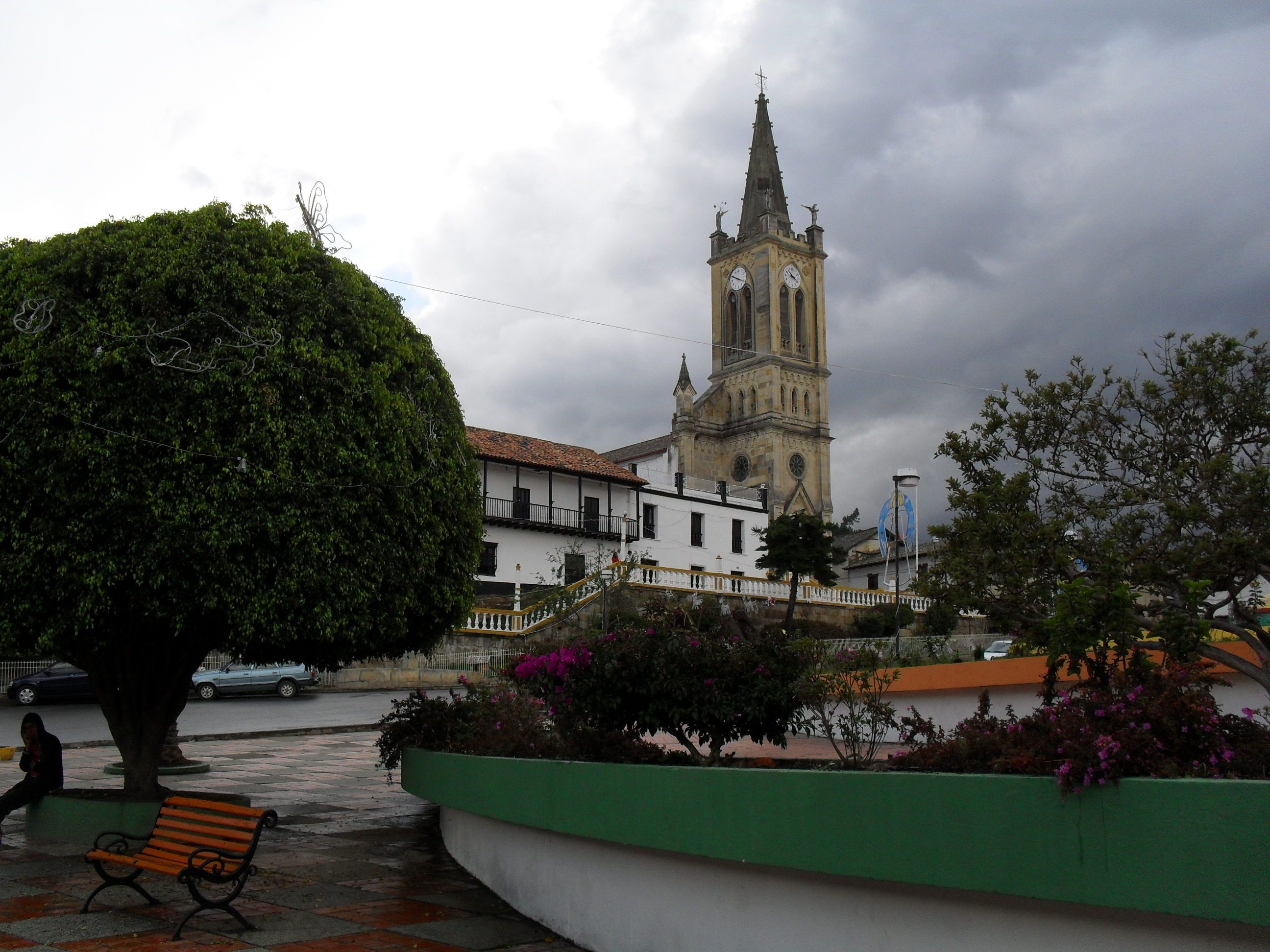 Parque principal del municipio de Turmequé, Boyacá, Colombia; al fondo la iglesia